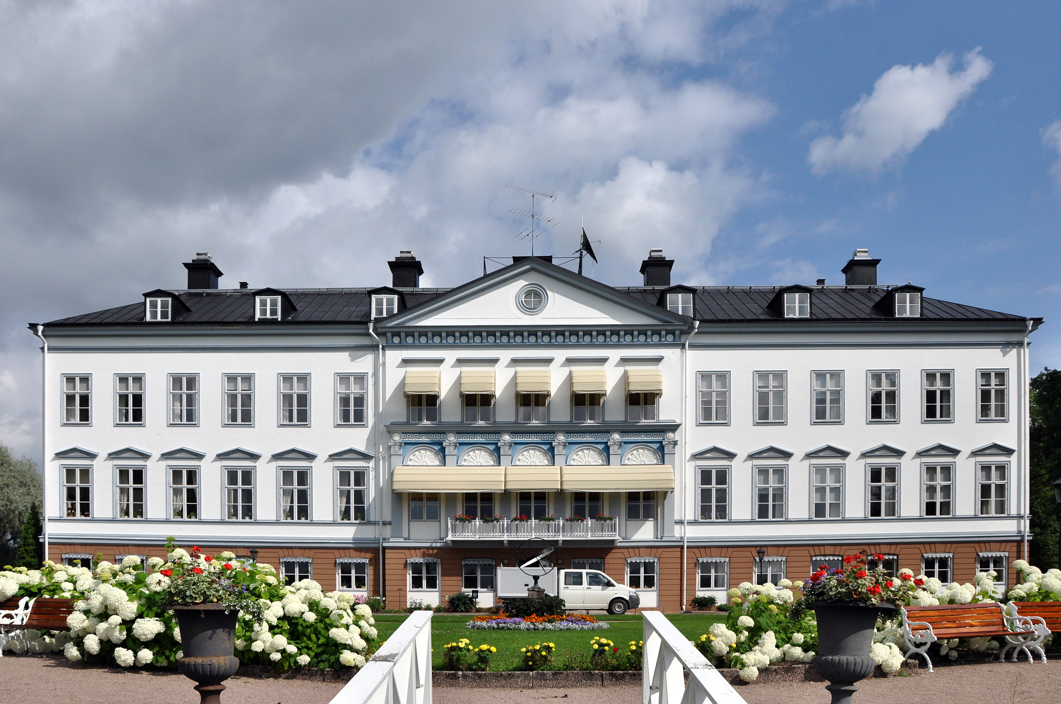 Gysinge herrgård vid Gysinge bruk. Idag Pensionärernas Riksorganisations folkhögskola. Gysinge bruk är ett Riksintresse för kulturmiljövården (Gävleborgs län 903)